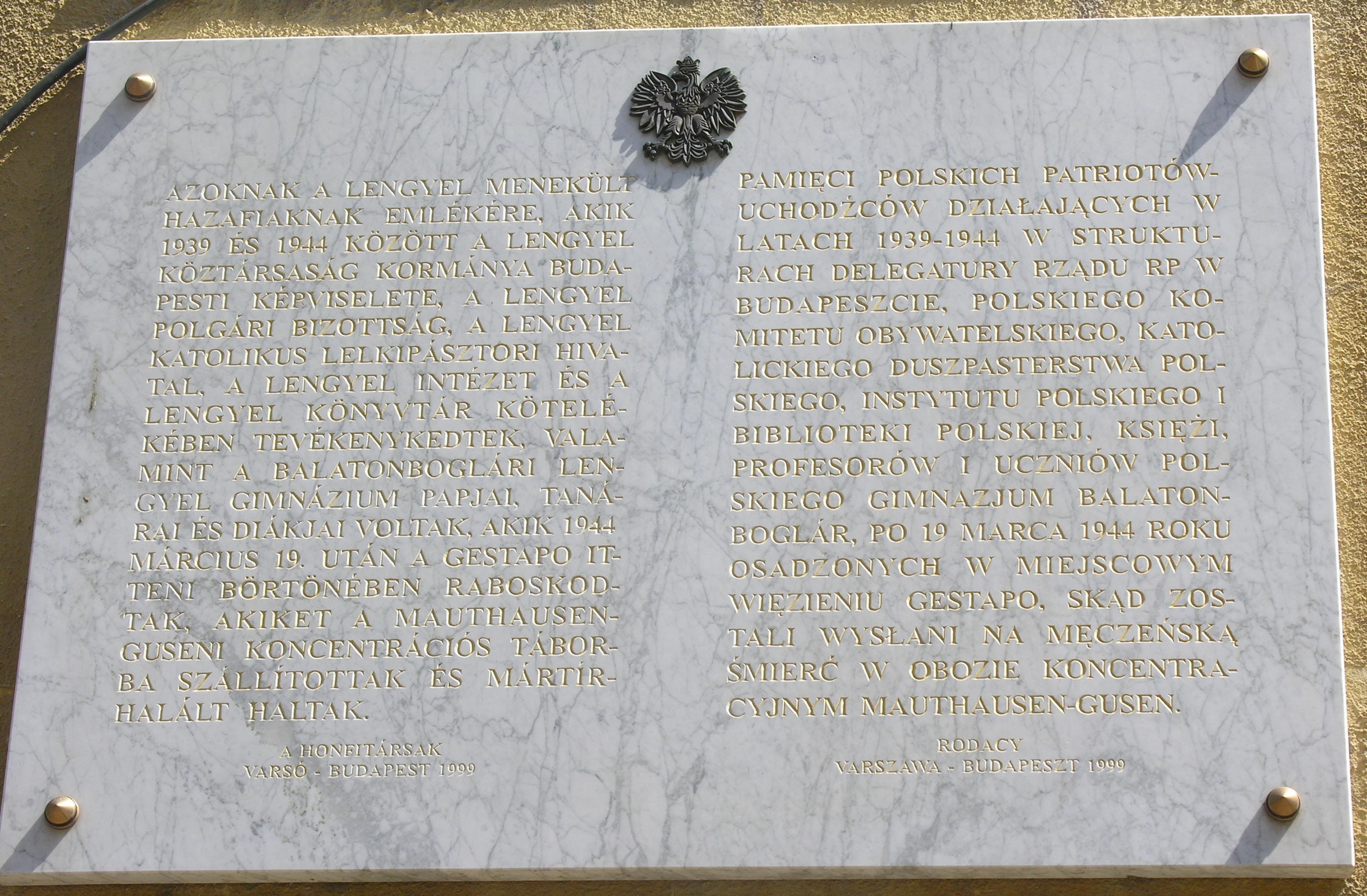 Lengyel menekültek emléktáblája, Budapest, II., Gyorskocsi utca 25.